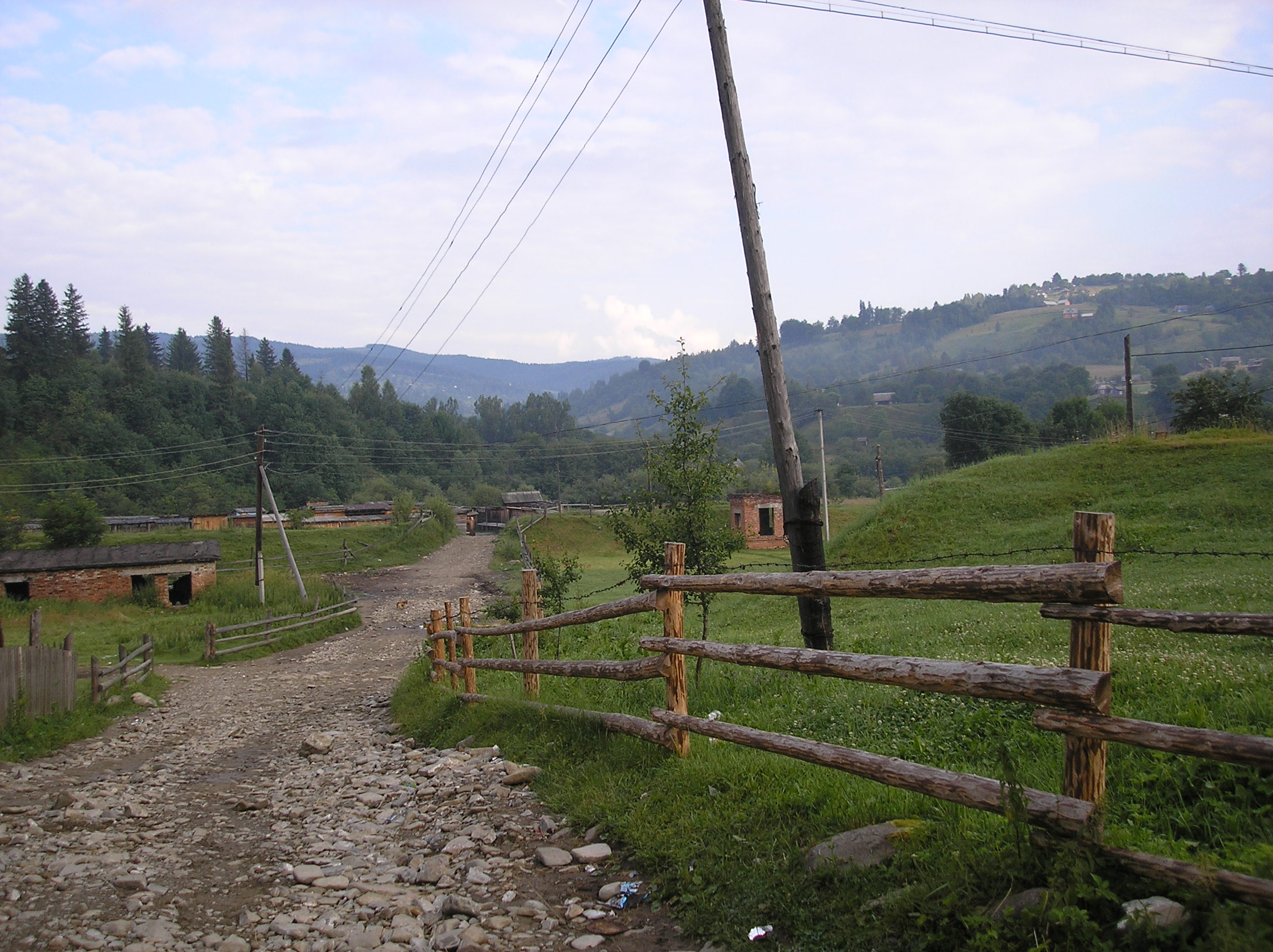 Будинок у с.Космач